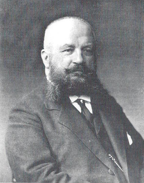 Porträtfotografie von Heinrich Franz Lehmann